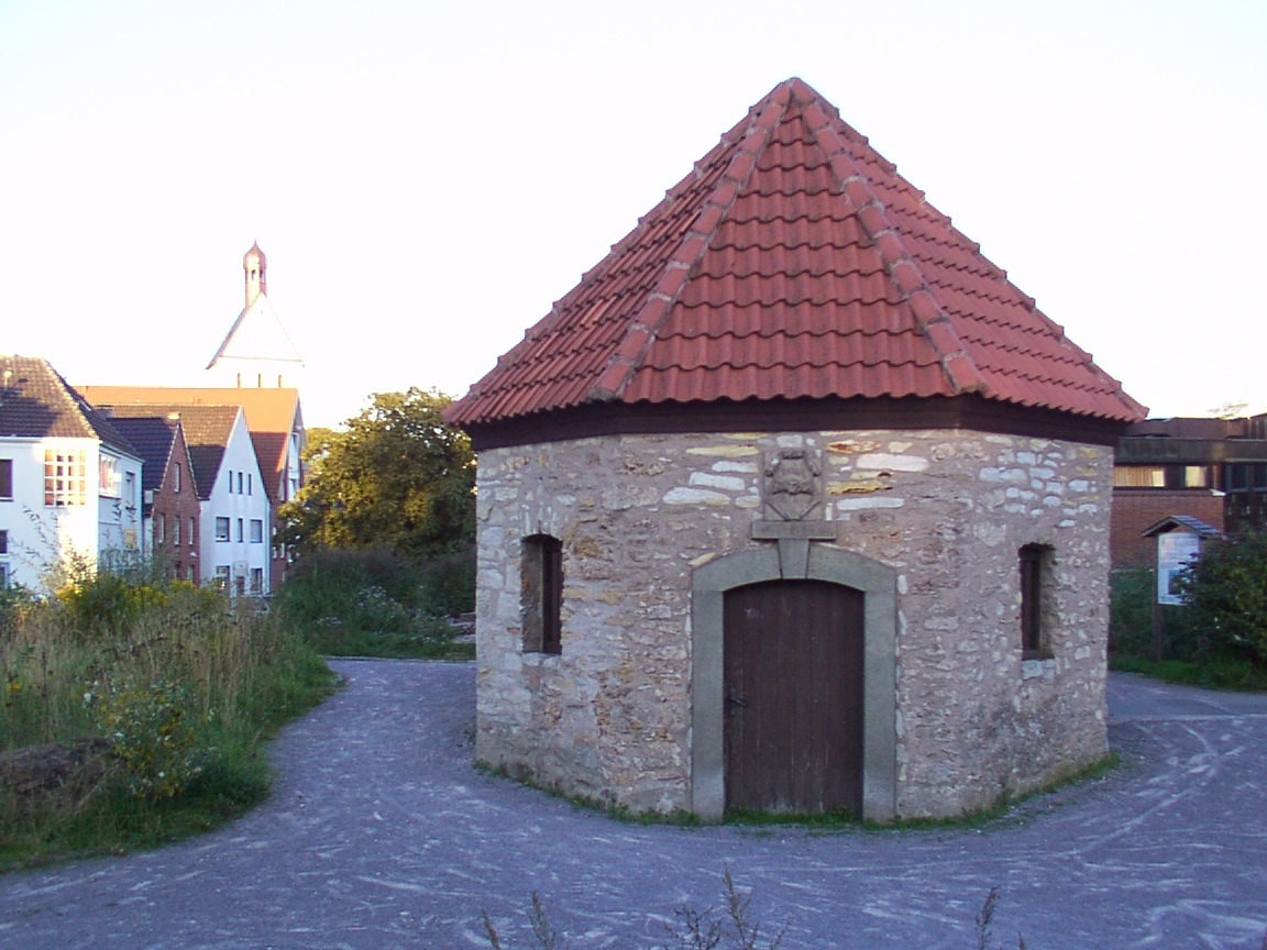 Salzkotten: Brunnenhaus der Unitasquelle This is a photograph of an architectural monument.